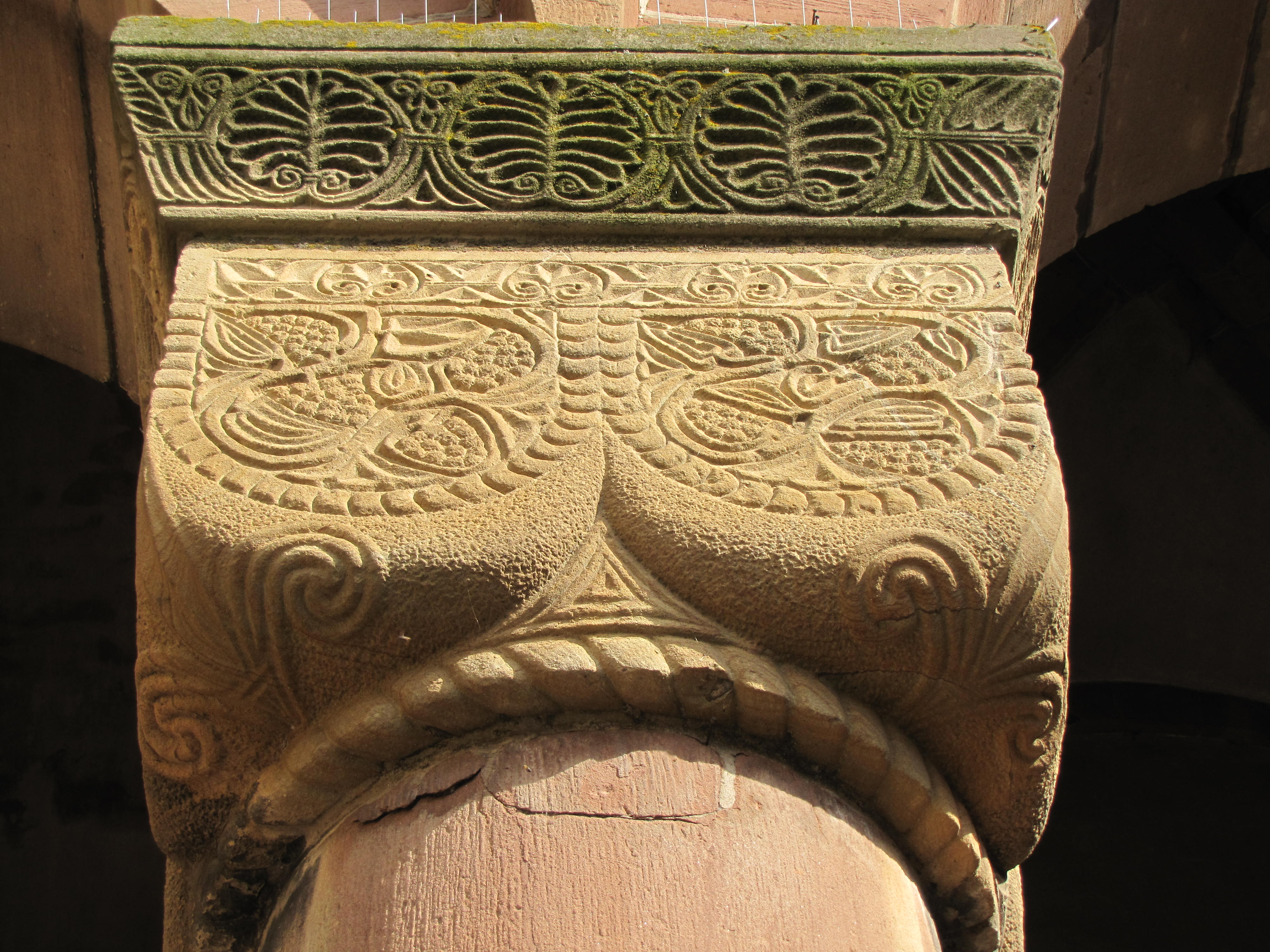 Alsace, Bas-Rhin, Abbatiale Saint-Étienne de Marmoutier (PA00084783, IA67007715). Chapiteau cubique à besants du porche roman (vers 1150)